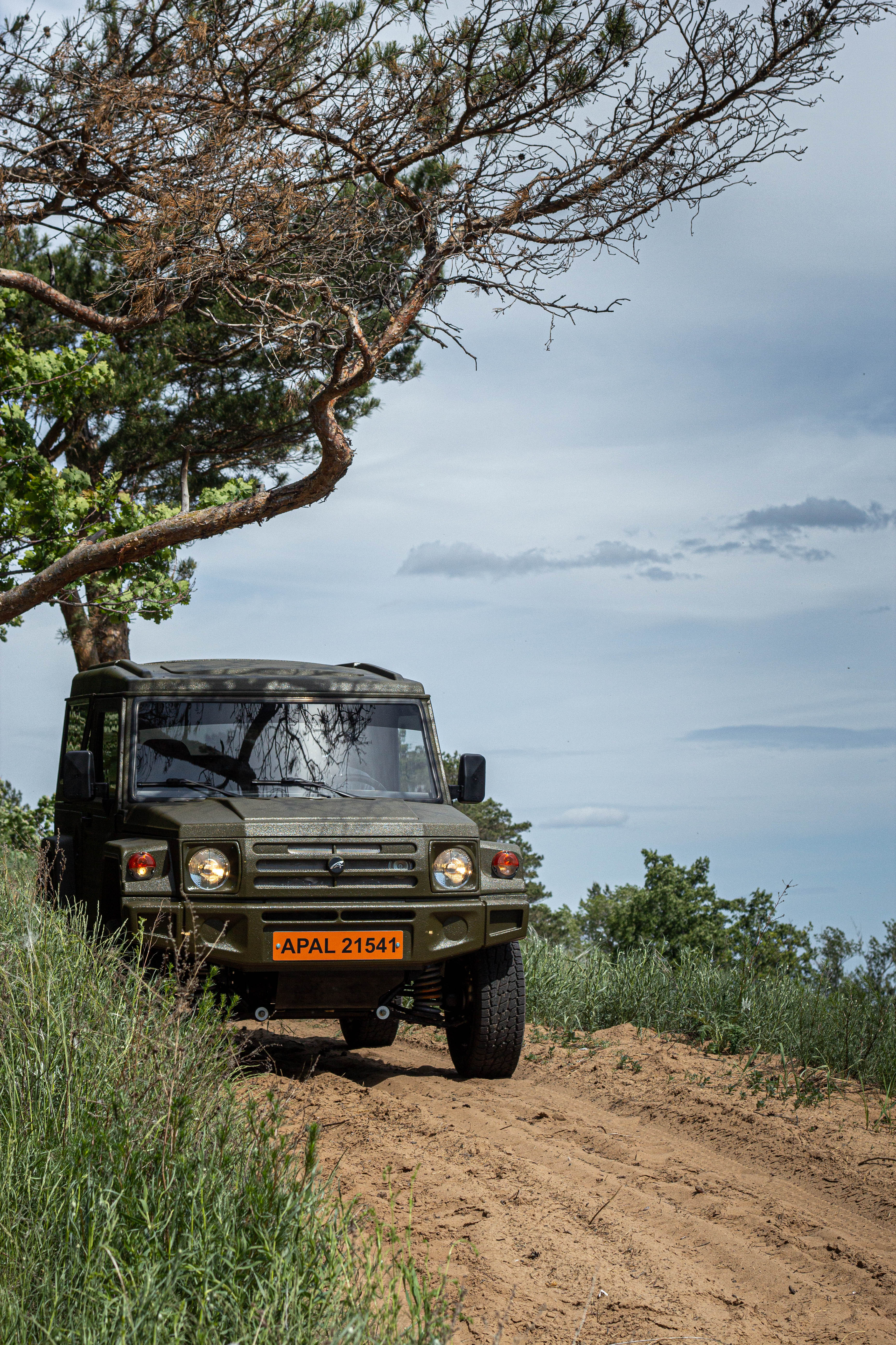 Сталкер Апал-21541